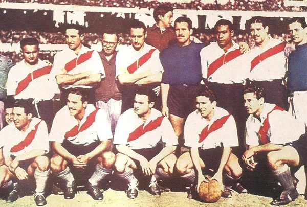 Campeón 1941. Arriba: Yácono, Vaghi, Rodolfi, Barrios, Cadilla y Ramos. Abajo: Muñoz, Moreno, D’Alessandro, Labruna y Pedernera.